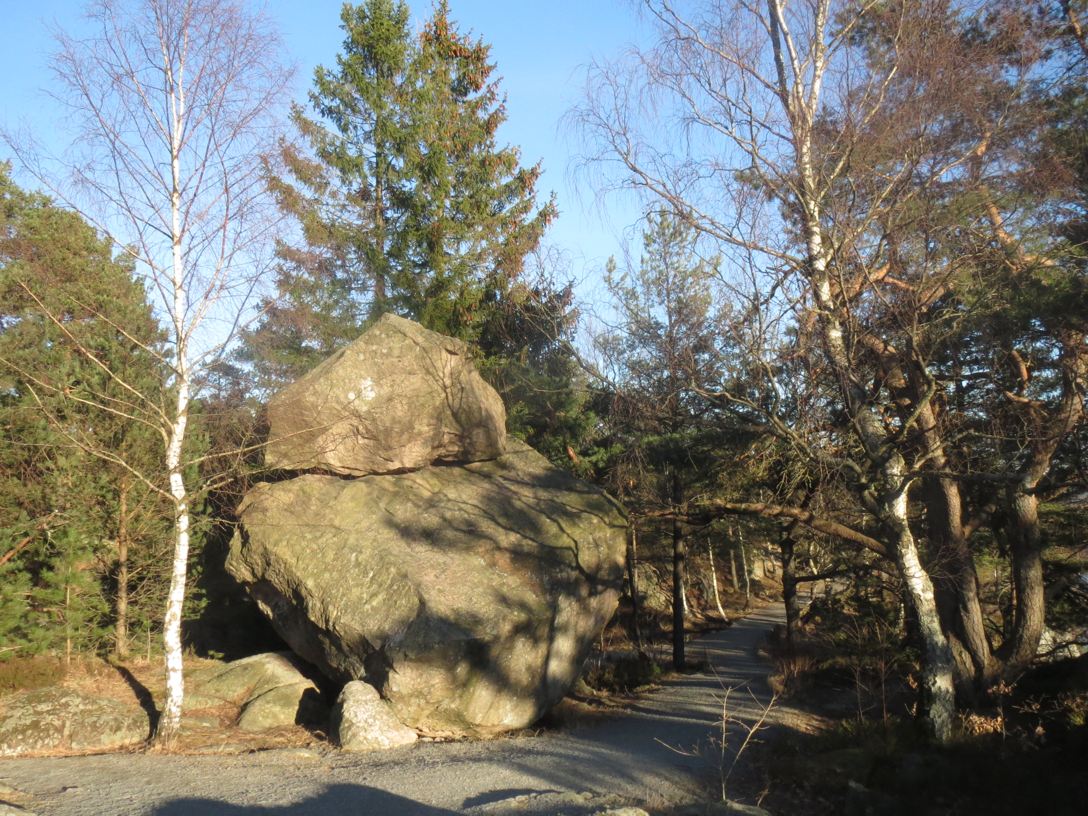 Kjempesteinen i Baneheia, Kristiansand